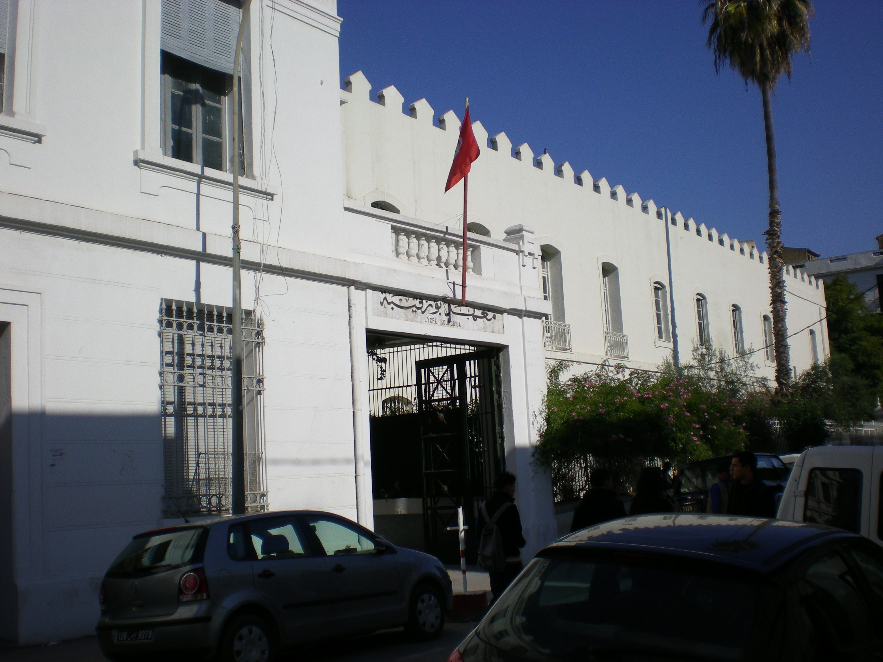 Lycée Pilote Bourguiba, aciennement lycée Carnot de Tunis